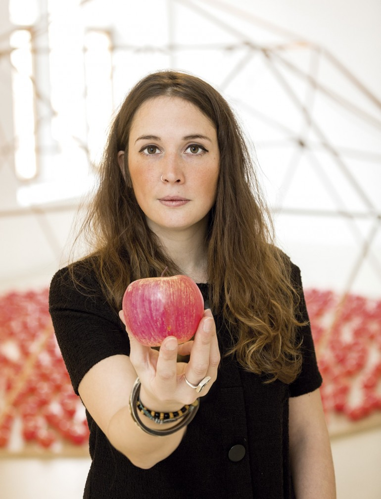 Irantzu Lekue artista, sagarra eskuan duela.